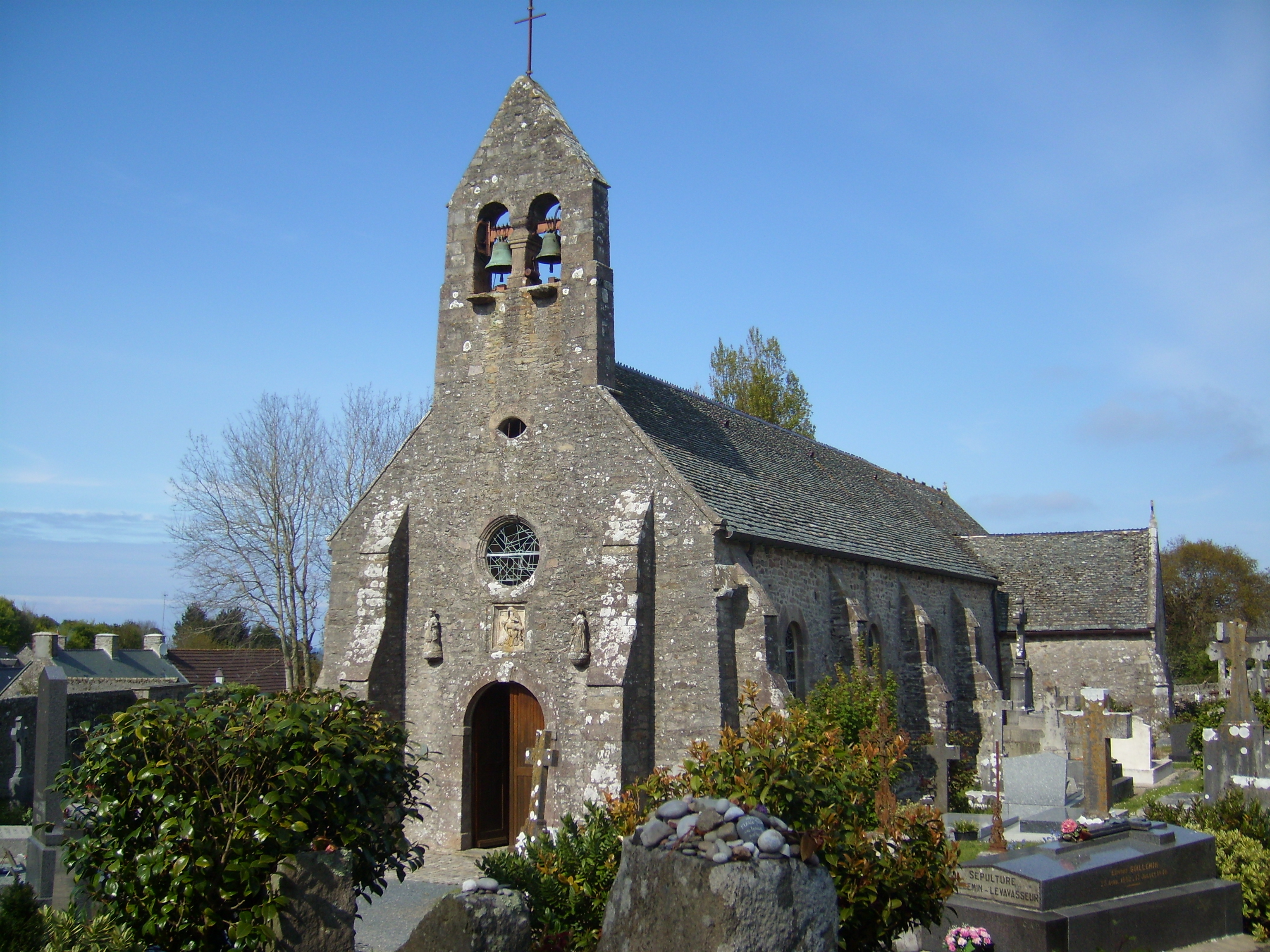 Omonville-la-Petite - Eglise Saint-Martin